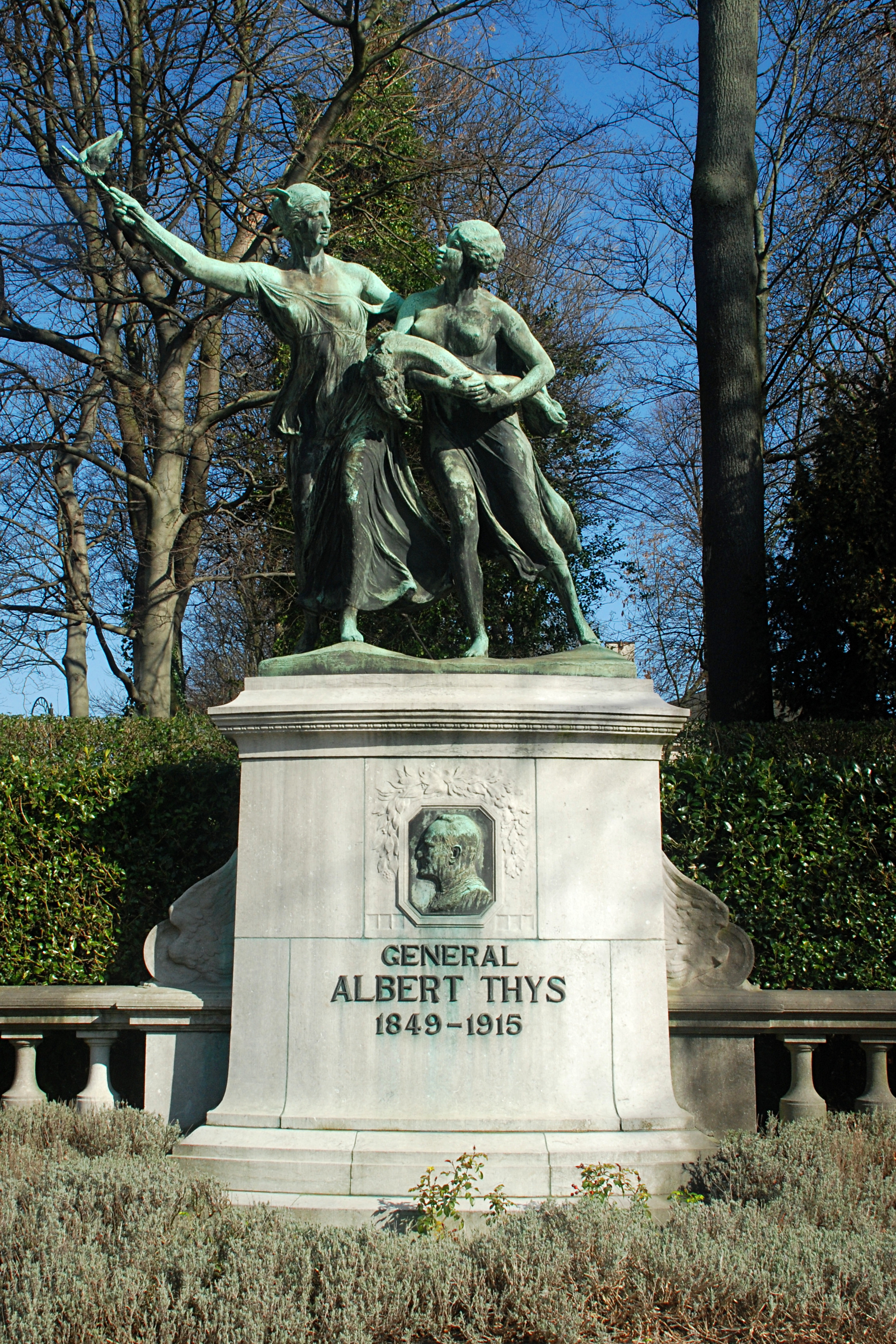 Belgique - Bruxelles - Monument au Général Thys